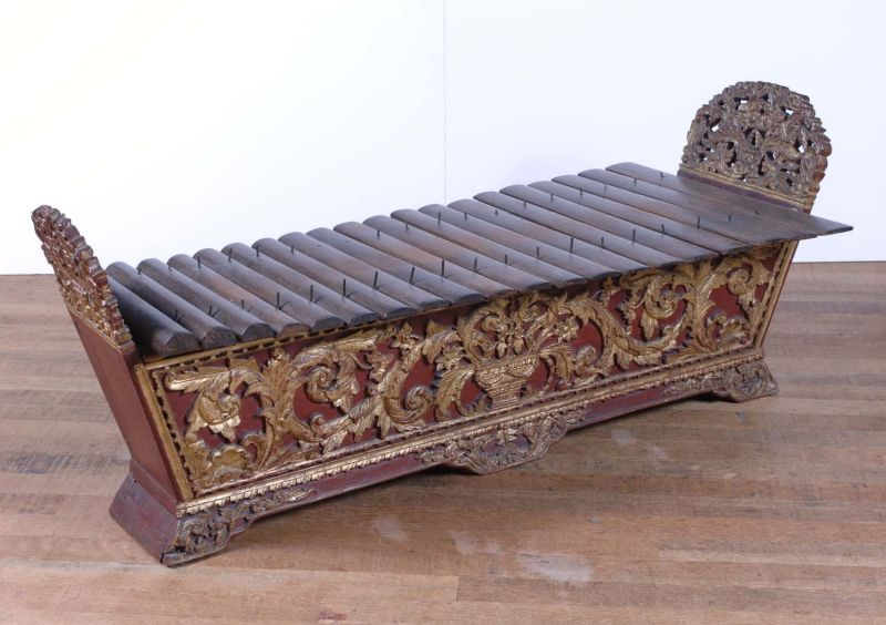 Slaginstrument. Het houtsnijwerk (ukiram) van de onderstellen is gemaakt in de beroemde Djajadipuram volgens aanwijzingen van het toenmalige hoofd. De versieringsmotieven vertonen een melange van 19e eeuwse Biedermeyermotieven (de plantenbak op de gender, de barung en de gambang, het bladermotief) en authentieke Javaanse ornamenten. De gamelan is afkomstig uit de kapatihan van Jogjakarta, waar deze in de tweede helft van de negentiende eeuw werd vervaardigd in opdracht van de regerende patih (eerste minister van het sultanaat Ngajogyaningrat), prins G.P.H. Hadiloesoemo. Deze gamelan werd als losse slendro-gamelan voor het privégebruik van deze patih gebouwd. Er hoort naar alle waarschijnlijkheid geen pelog-helft bij. Er zijn meer gevallen bekend van dergelijke slendro-gamelans uit de Jogja'se kapatihan. De slenthems maakten oorspronkelijk geen deel uit van deze gamelan, evenmin als de onversierde gender barung, die qua klank gewoon een overbodige verdubbeling is van de wél versierde gender barung. . Xylofoon met twintig toetsen, onderdeel van gamelan Slendro Unknown language: Gambang